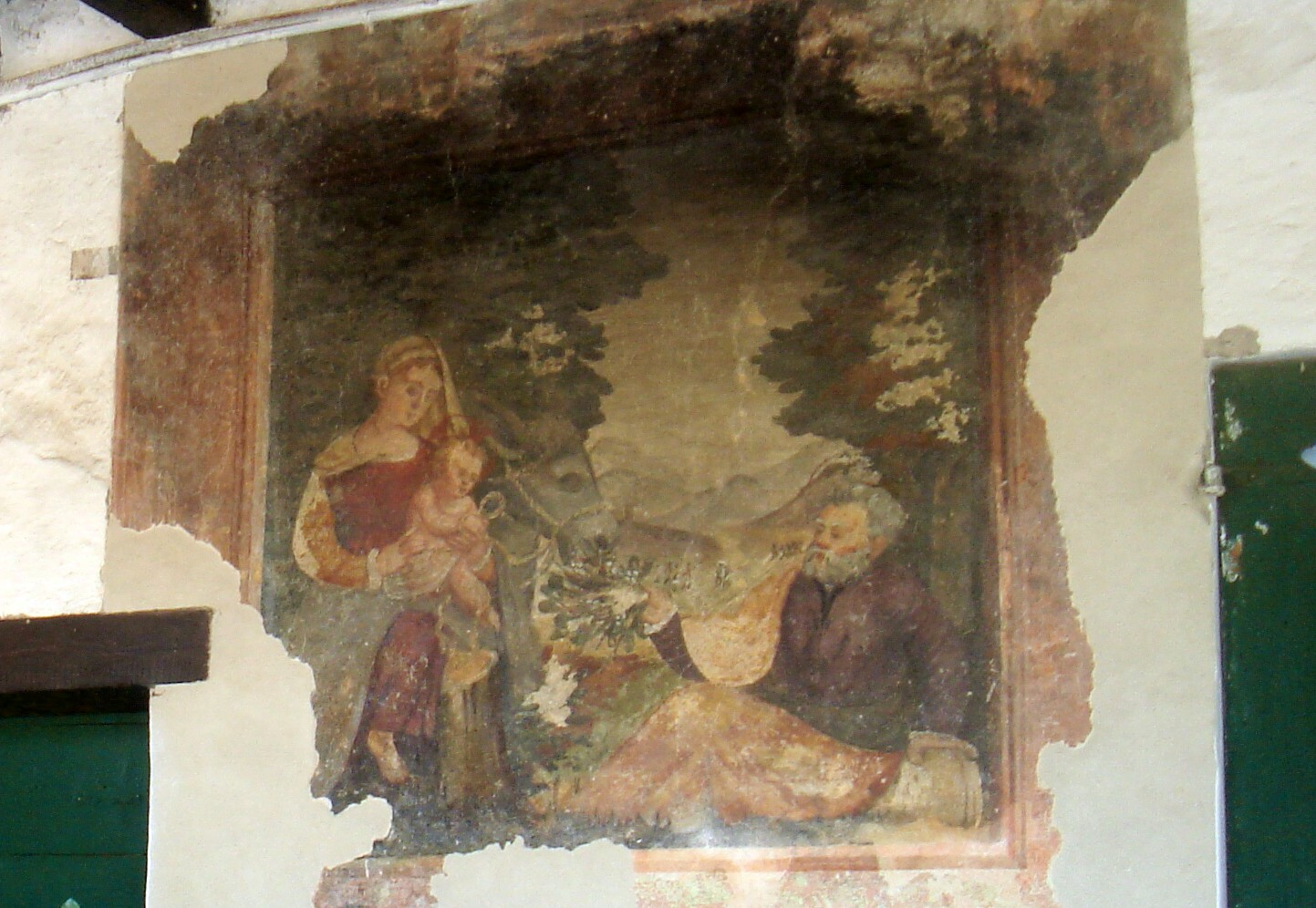 Castello Roganzuolo, affresco cinquecentesco sotto il portico dell'ex convento